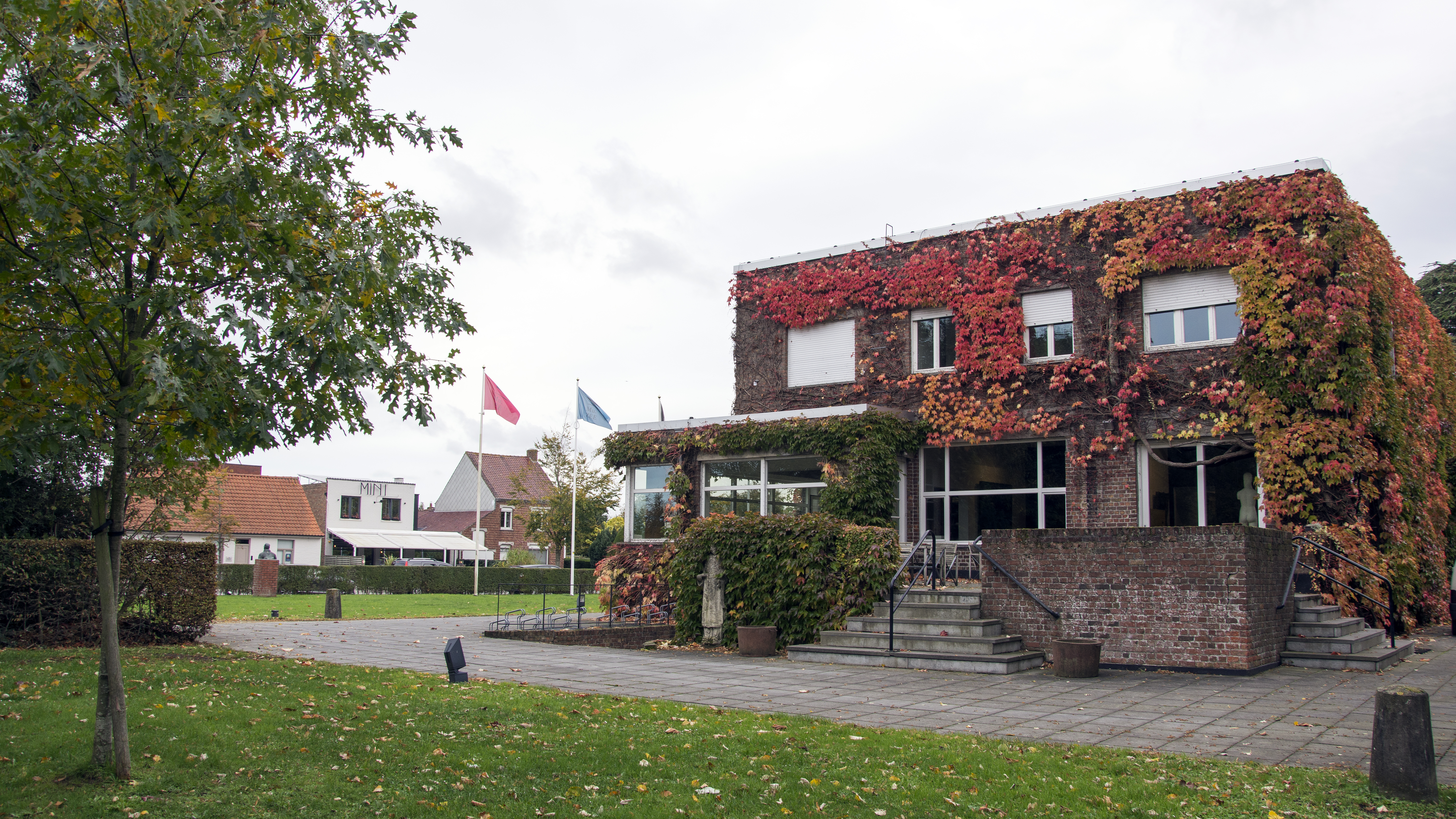 Permekemuseum Jabbeke (88745) 27-10-2019 11-47-52 This photo of immovable heritage has been taken in the Flemish Region